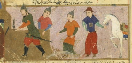 titre :destruction de laybalkî ? (Royaume Tangoute / Xixia) Gengis Khan et trois de ses quatres fils Enluminure datant de vers 1430, de Hérât en Afghanistan